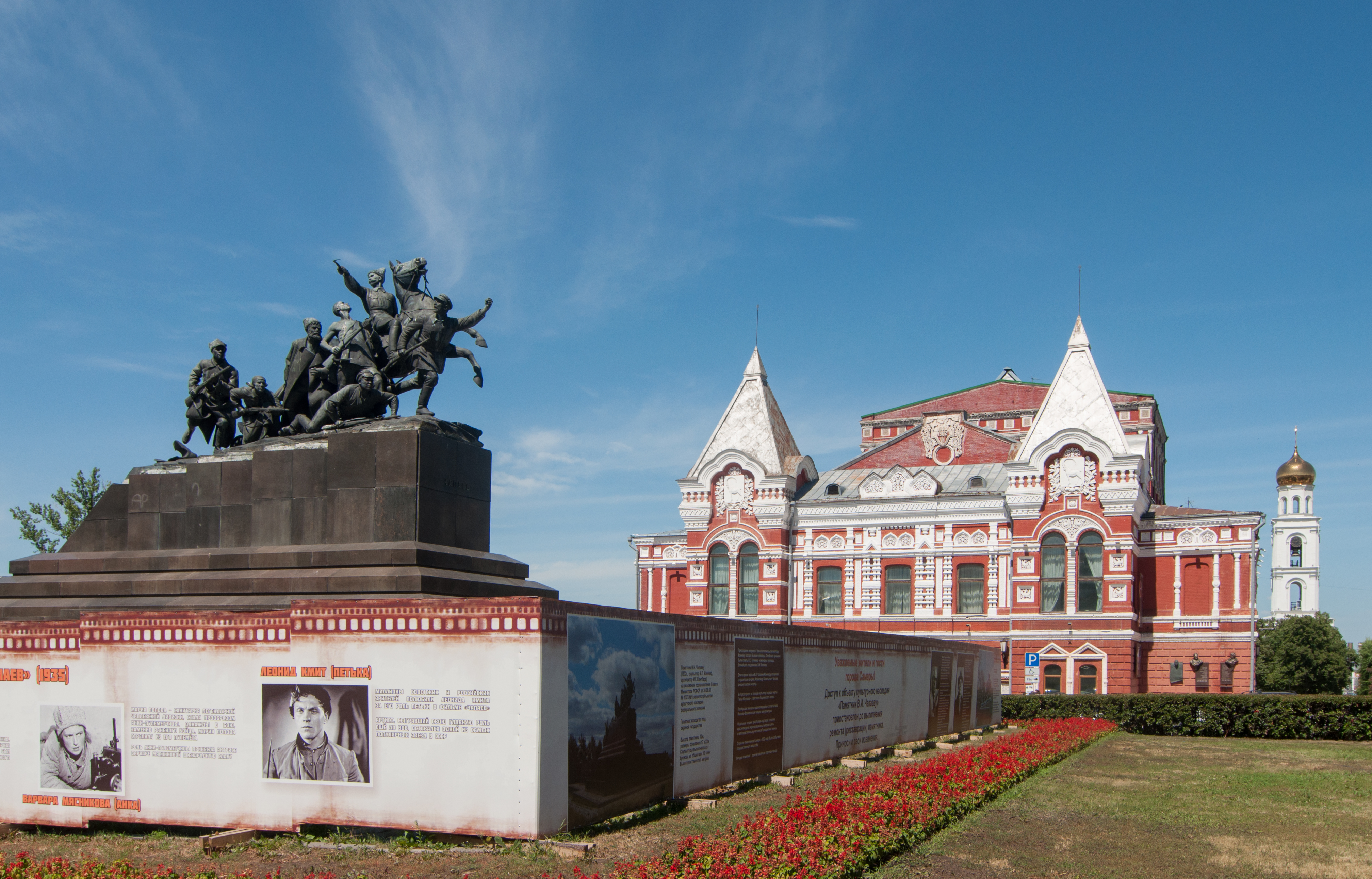 Памятник Чапаеву В.И.: площадь им. Чапаева, Самара, Самарская область